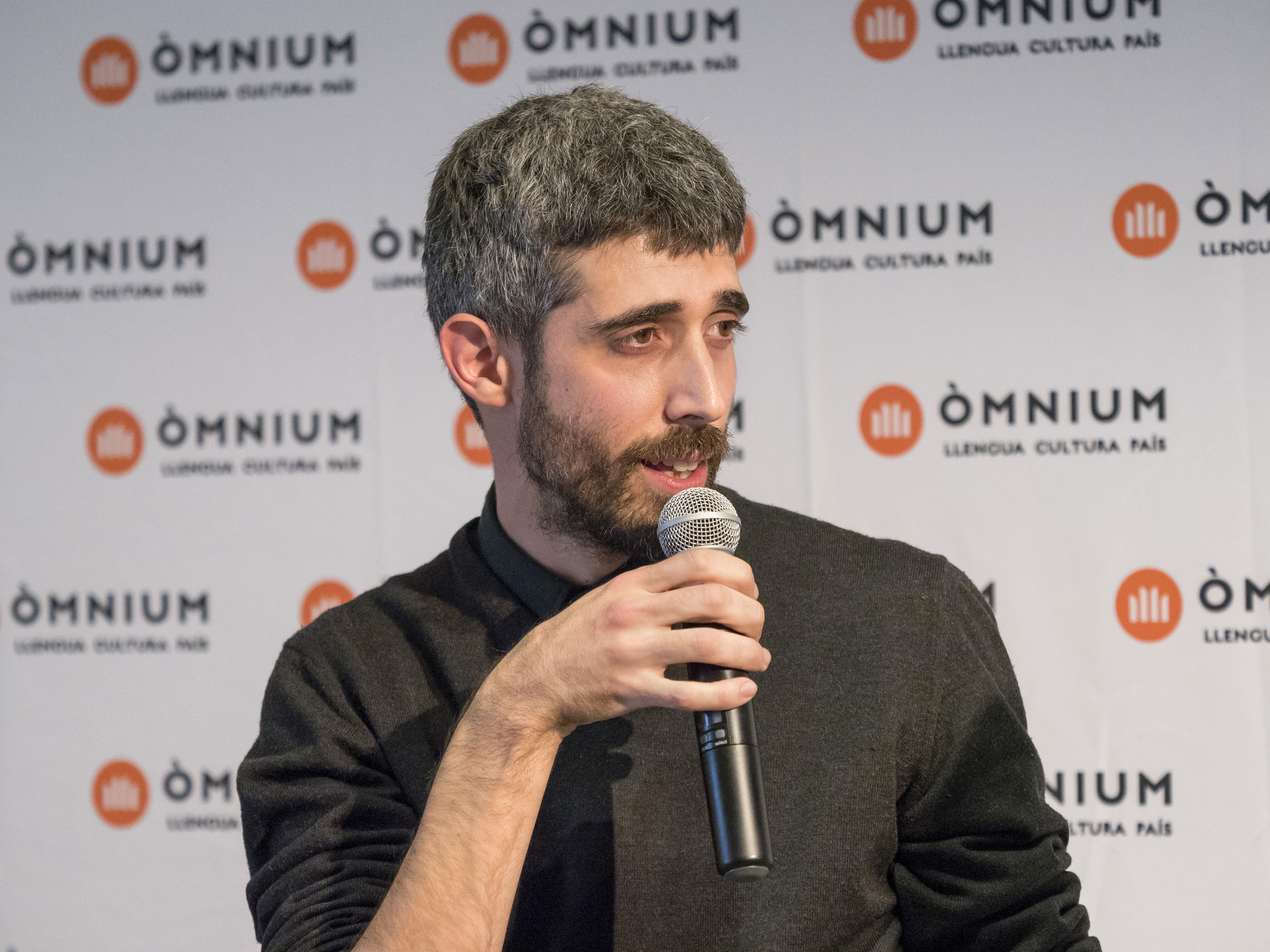 Jordi Cabré s'endú el 59è Premi Sant Jordi de novel·la amb 'Digues un desig'. El 21è premi Mercè Rodoreda de contes i narracions és per 'El país dels cecs' de Víctor García Tur i el mallorquí Carles Rebassa s’endú el premi Carles Riba de poesia que enguany arriba a la 60a edició, amb l’obra 'Sons bruts'. La maresmenca Núria Franquet guanya el 56è premi Josep M. Folch i Torres de novel·les per a nois i noies amb el seu primer llibre, La Liang dins del quadre. I Maite Carranza ha estat guardonada amb el 45è Premi Joaquim Ruyra de narrativa juvenil amb L’alè del drac.